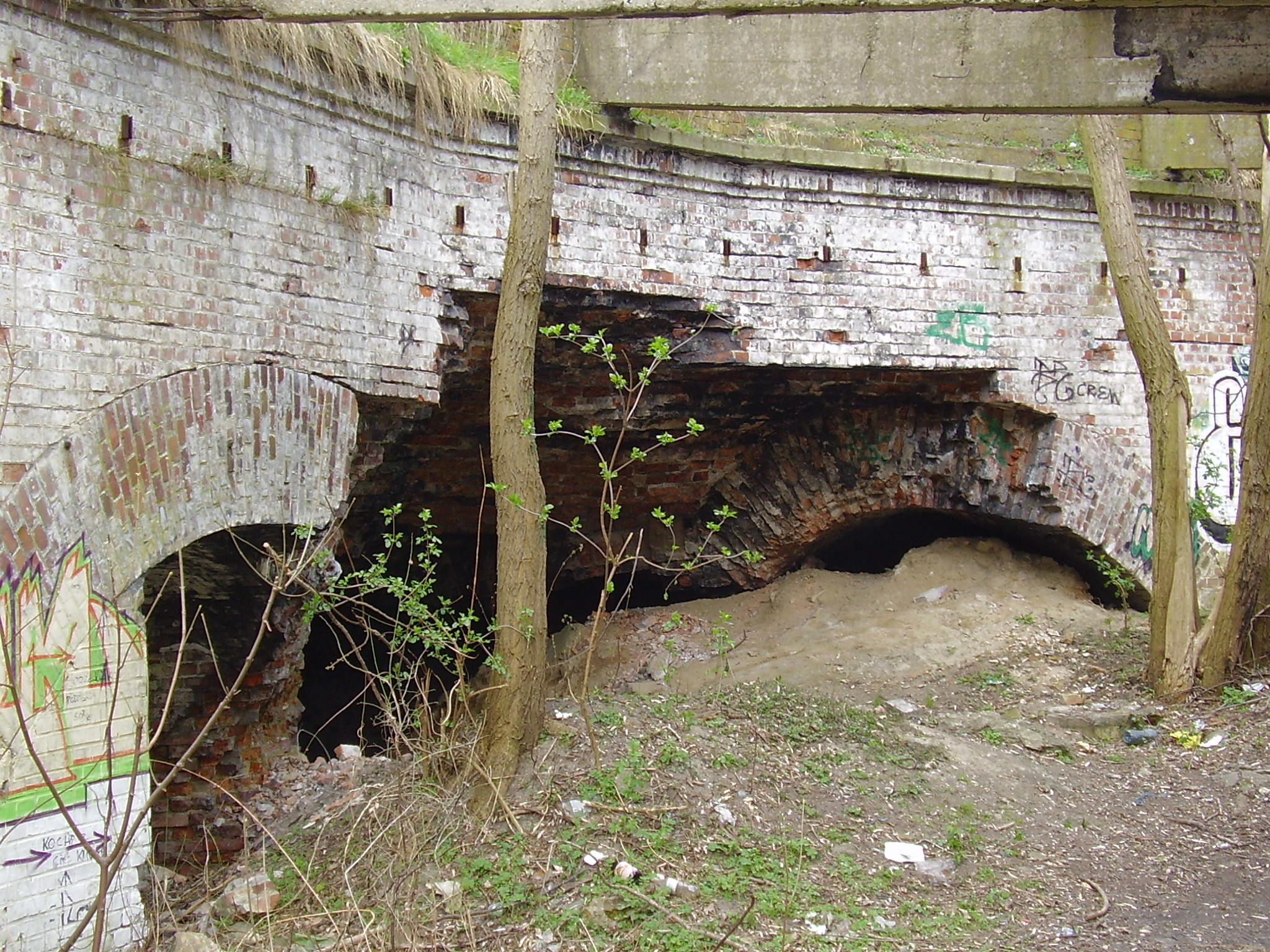 Kaponiera czołowa